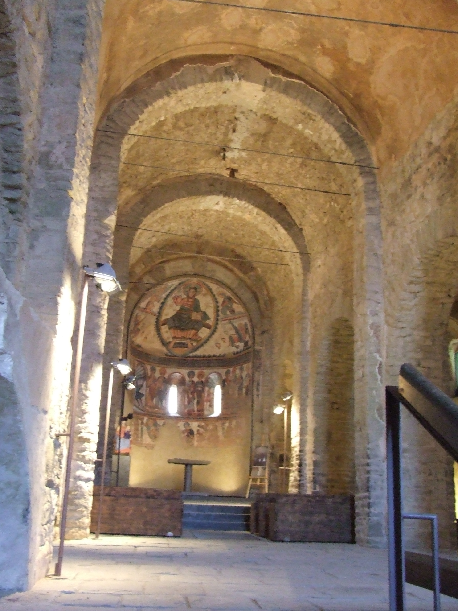 Nau central de Santa Maria de Mur (Mur, Castell de Mur, Pallars Jussà)